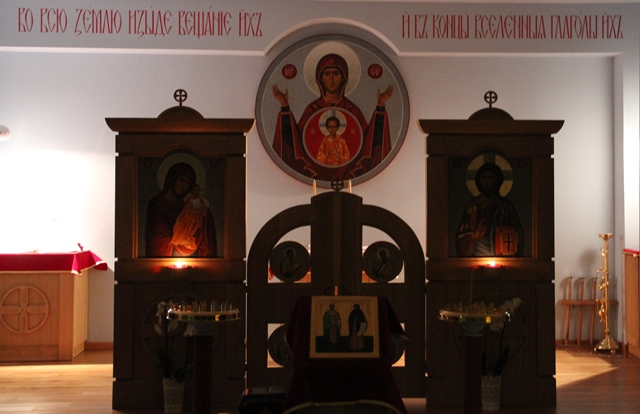 Школьная часовня Святых Кирилла и Мефодия была освящена Белостокско-Гданьским архиепископом Иаковым 25 января 2014 года.